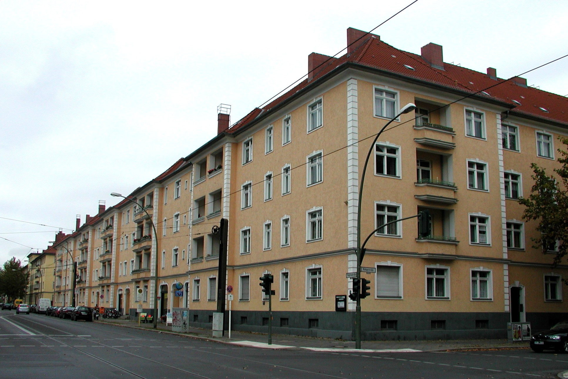 Die ehemaligen BVG-Wohnblöcke im Oktober 2007